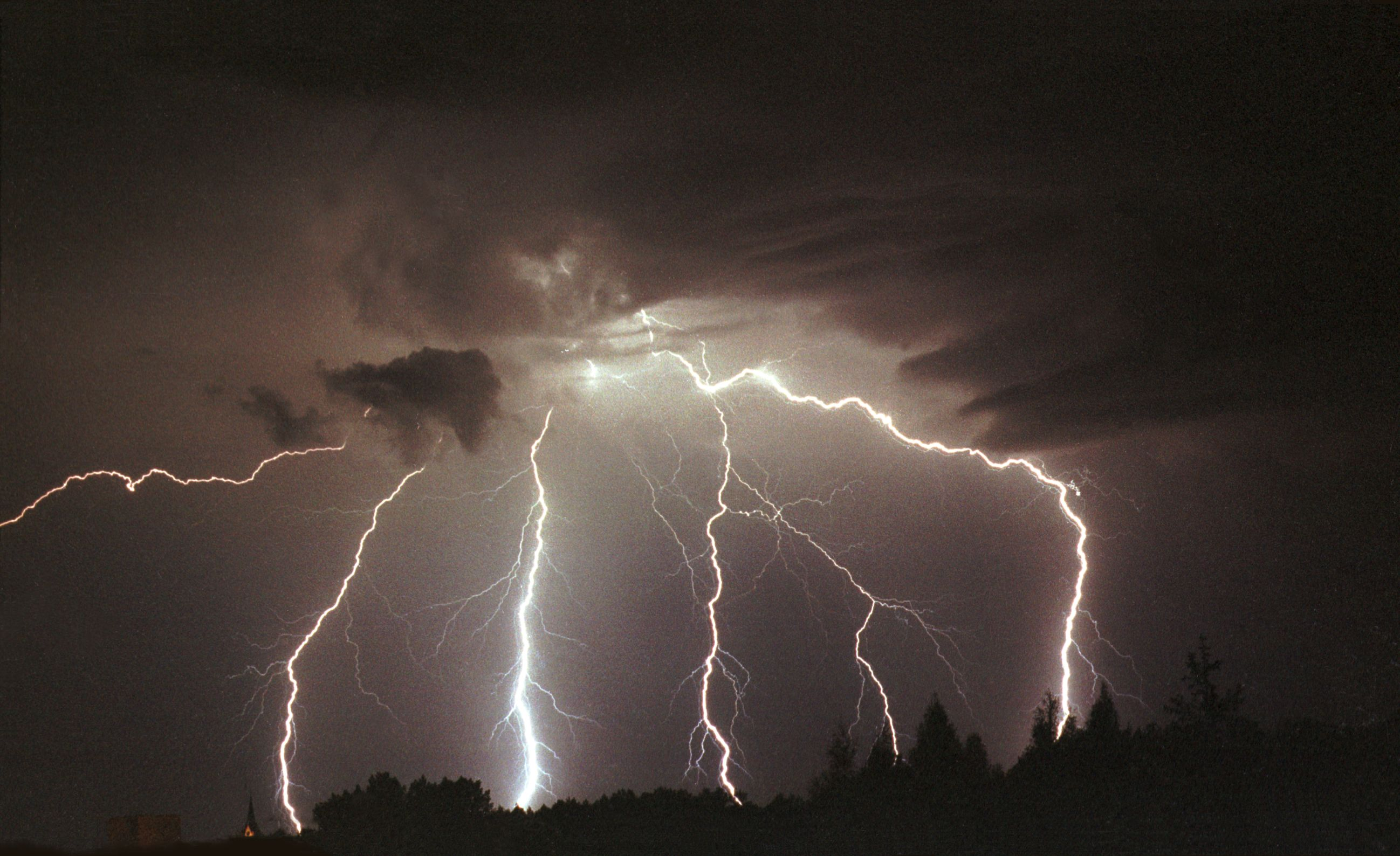 Fotka Pioruna autor-Ziemowit Porębski